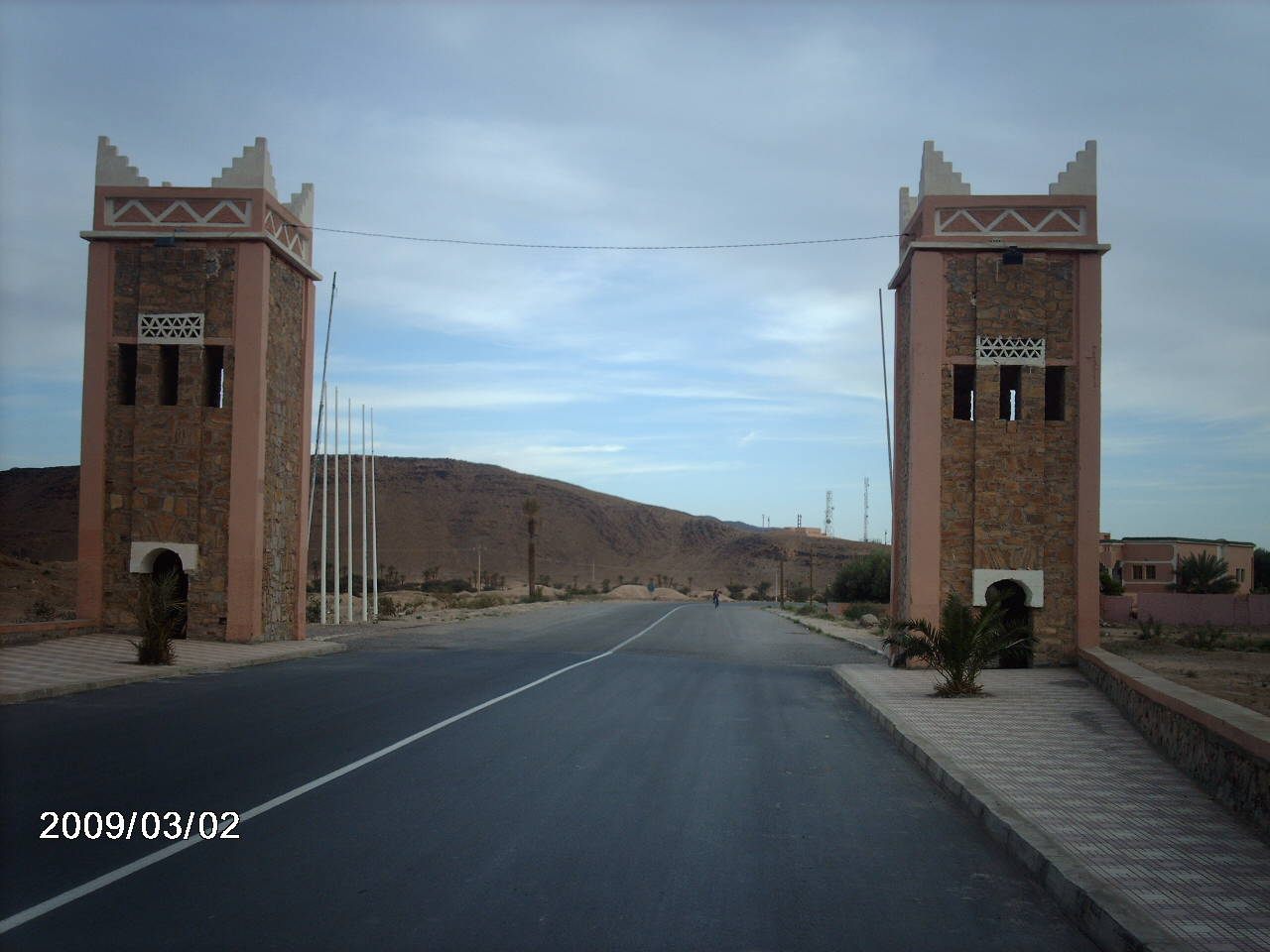 مدخل مدينة طاطا